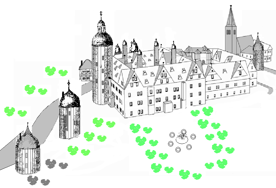 Rekonstruktionsversuch/ Die Skizze zeigt das Gröninger Residenz,- und Renaissanceschloss nach dem Verfall der Burggräben um 1600.